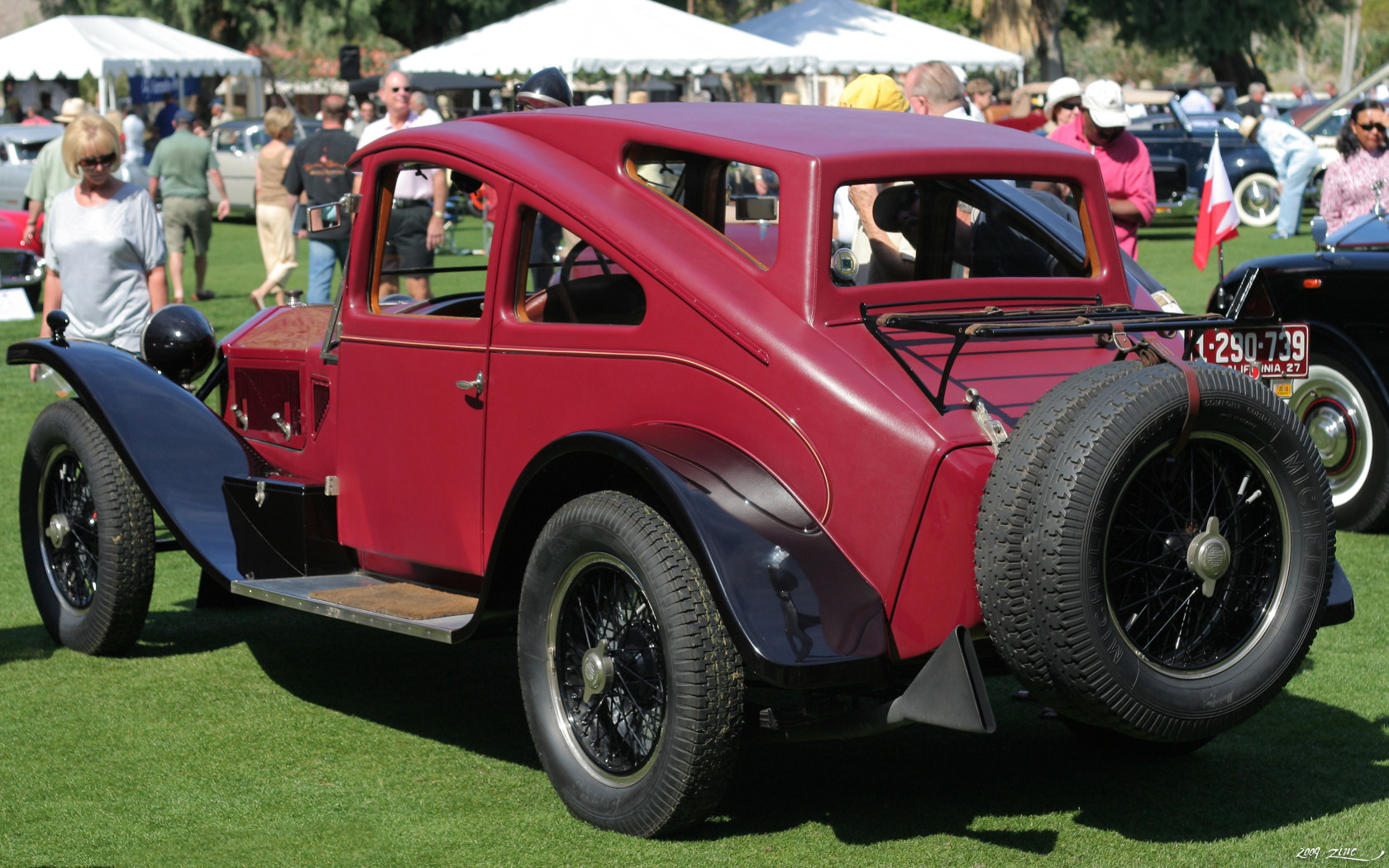 Lancia Lambda Airway Saloon del 1927, realizzata dalla carrozzeria inglese Albany su autotelaio a passo corto "Lambda" 7ª serie tipo 219 e commissionata dall'Olympia Motor Show di Londra, in onore al trasvolatore atlantico Charles Lindbergh. Monta il motore Lancia tipo 78 con 4 cilindri a V di 2.375 cm3 e la strumentazione di bordo è dotata di anemometro e altimetro.